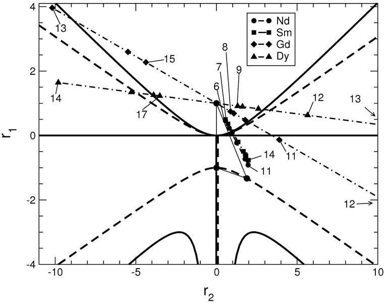 IBM